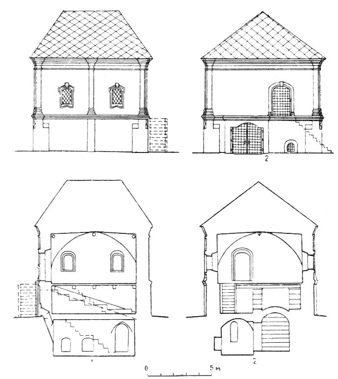 Darahan house